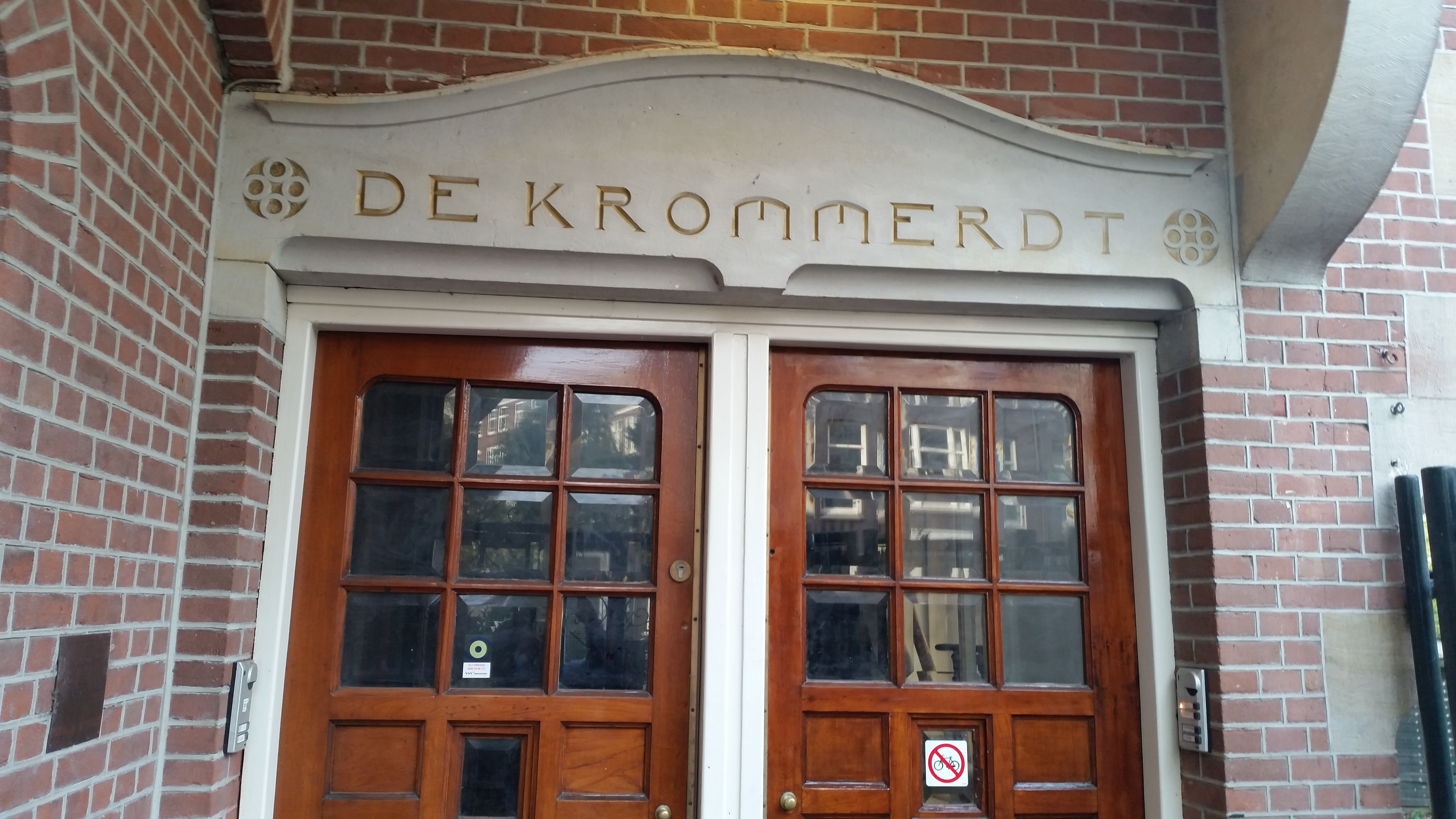 Admiraal de Ruijterweg 1-100, Amsterdam, Gebouw "De Krommerdt" op nr 95 van Oosterbaan